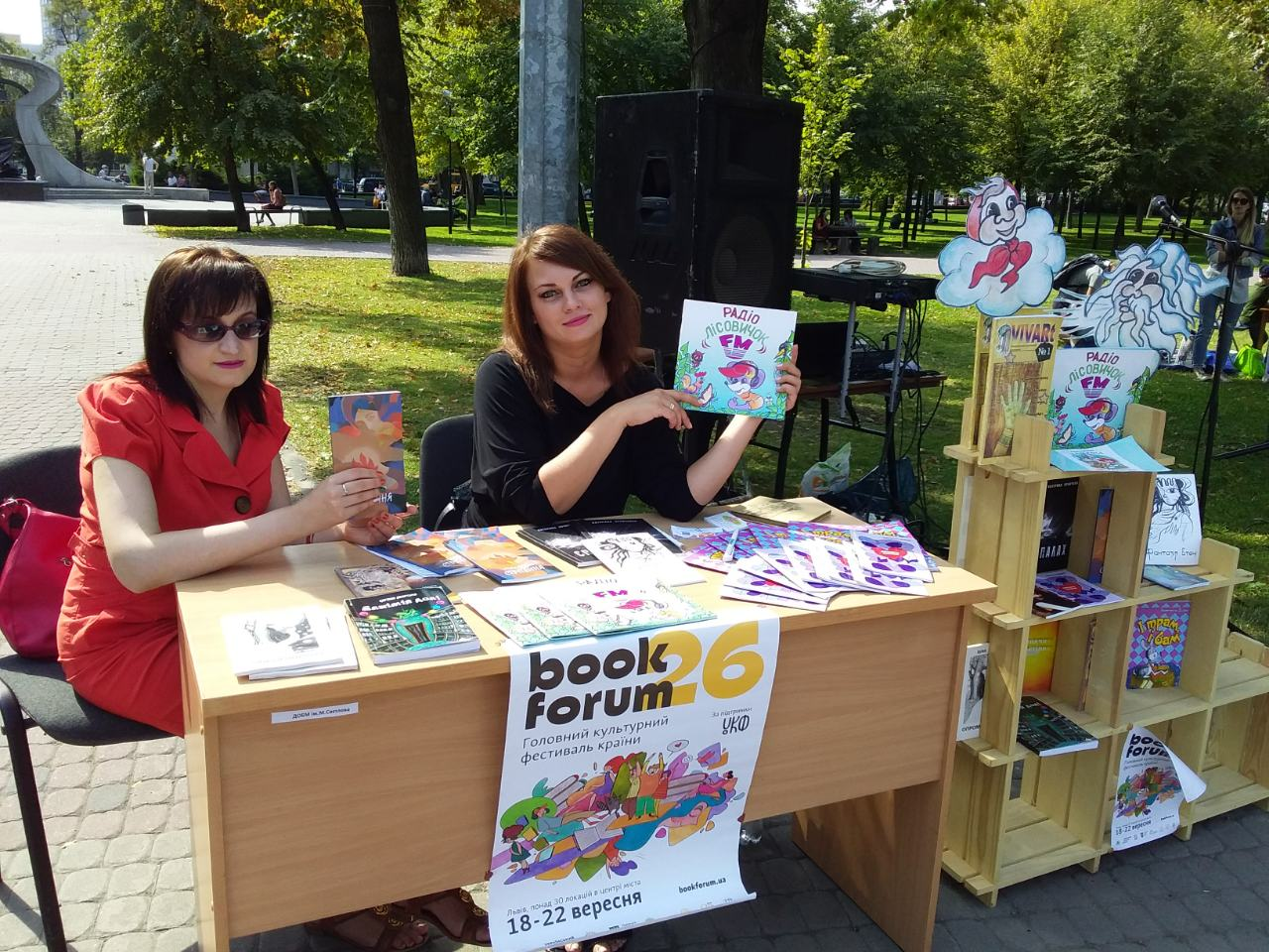 Марія Дружко і Олена Ляшенко з книжковою виставкою у Дніпрі